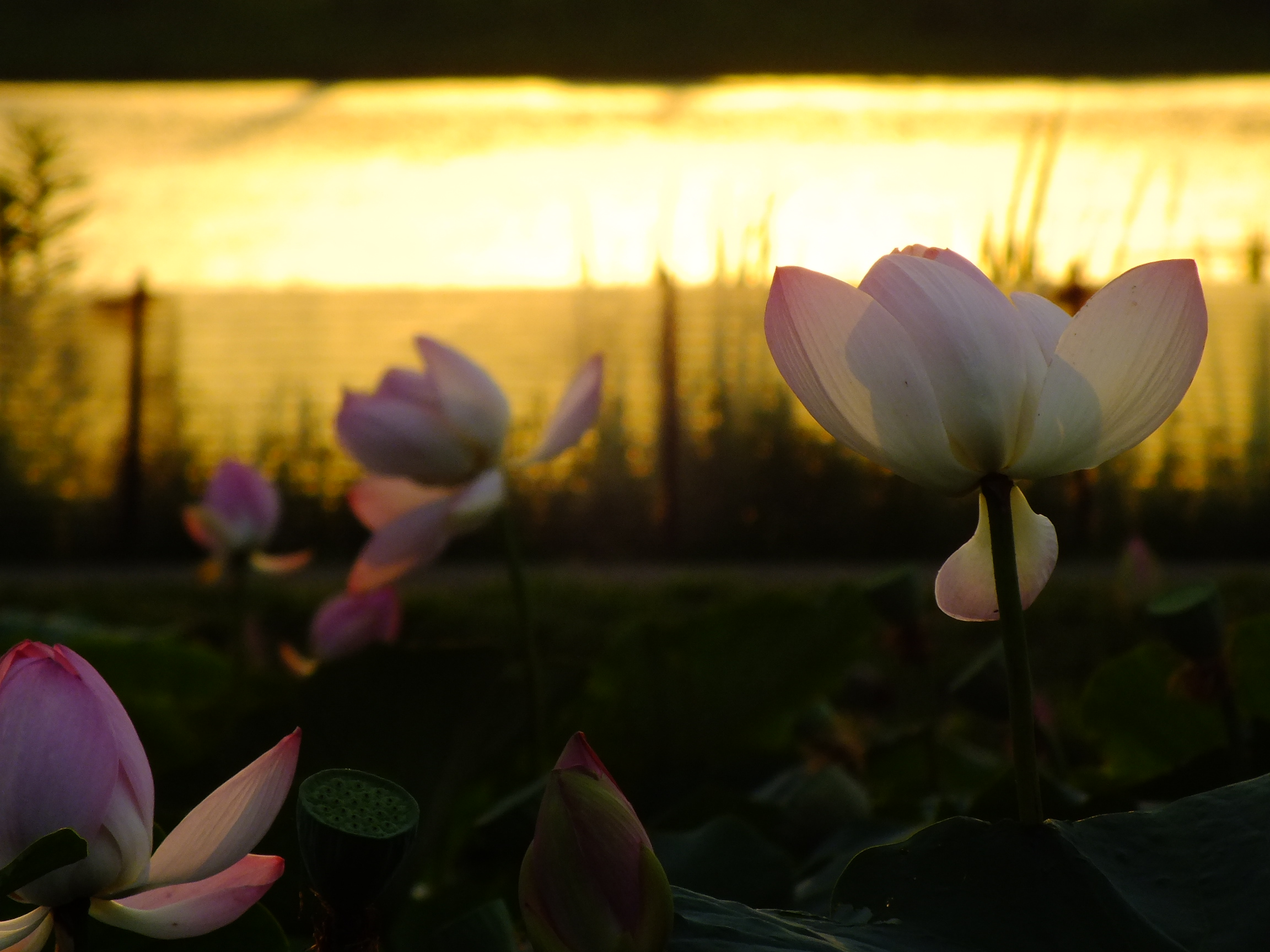 Hiraike-park (平池公園 大賀ハス)兵庫県加東市東古瀬